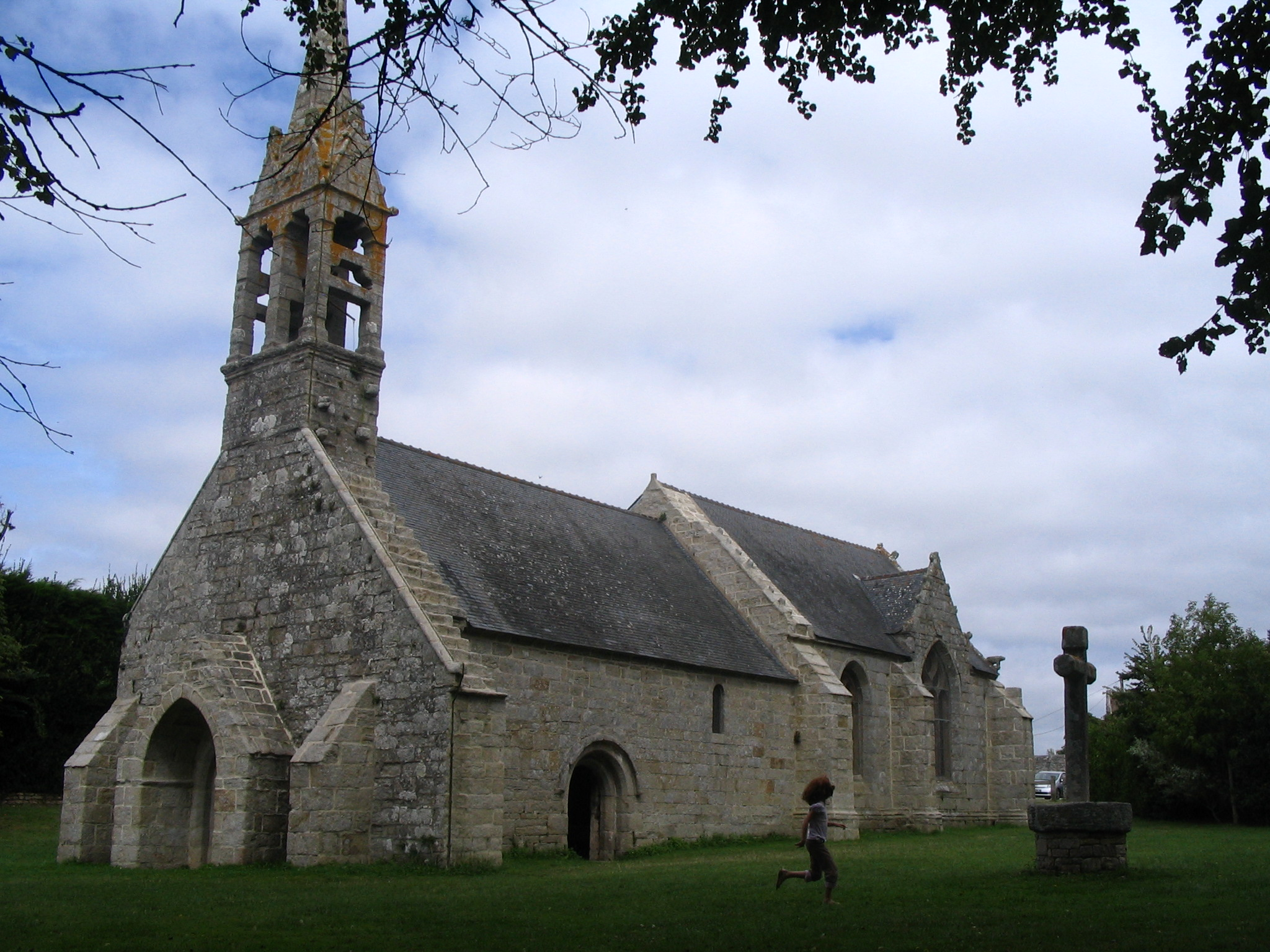 Penmar'ch, Chapelle de la Madeleine, XVème siècle, Finistère, France